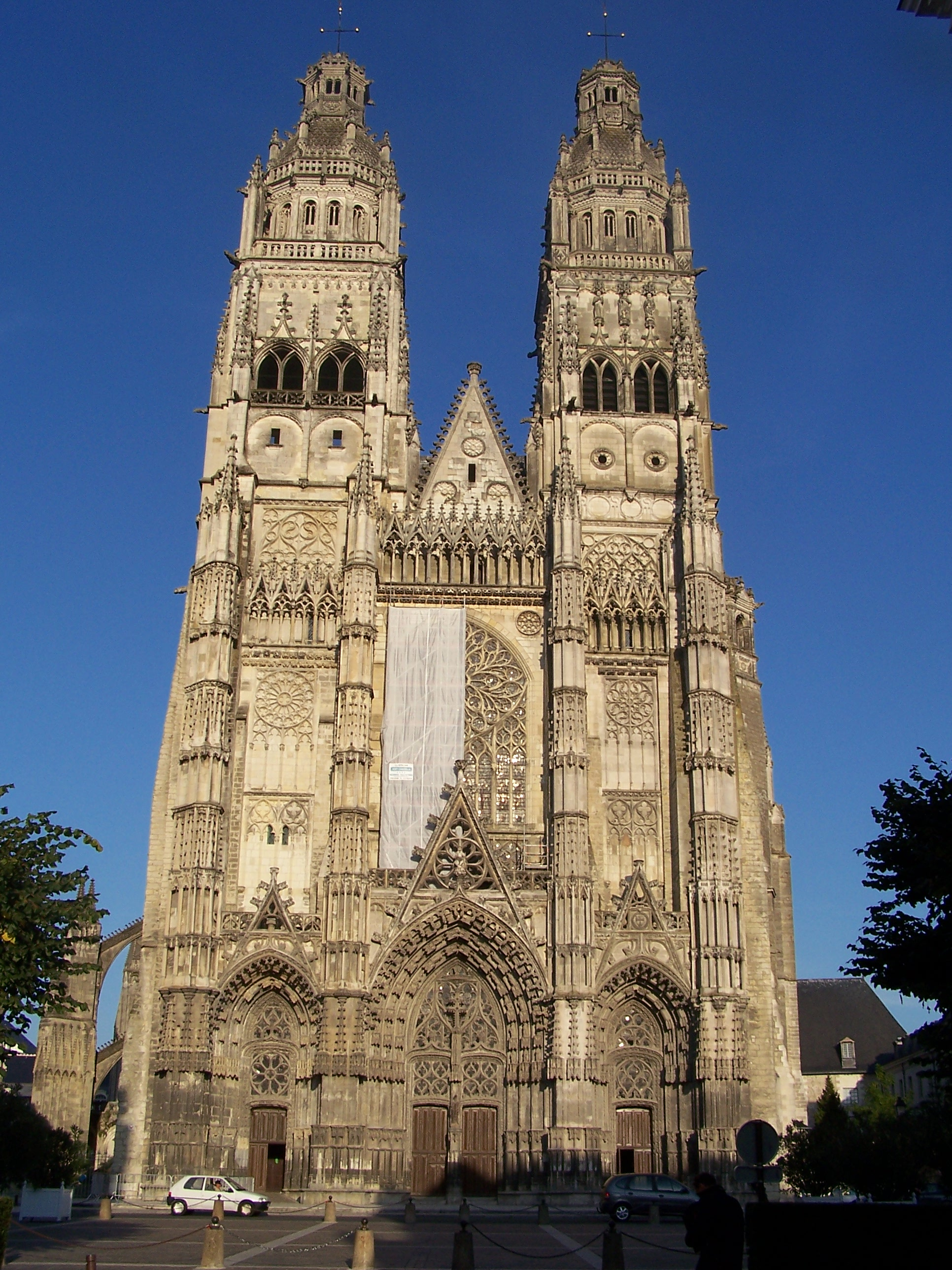 Tours-i Saint-Gatien katedrális